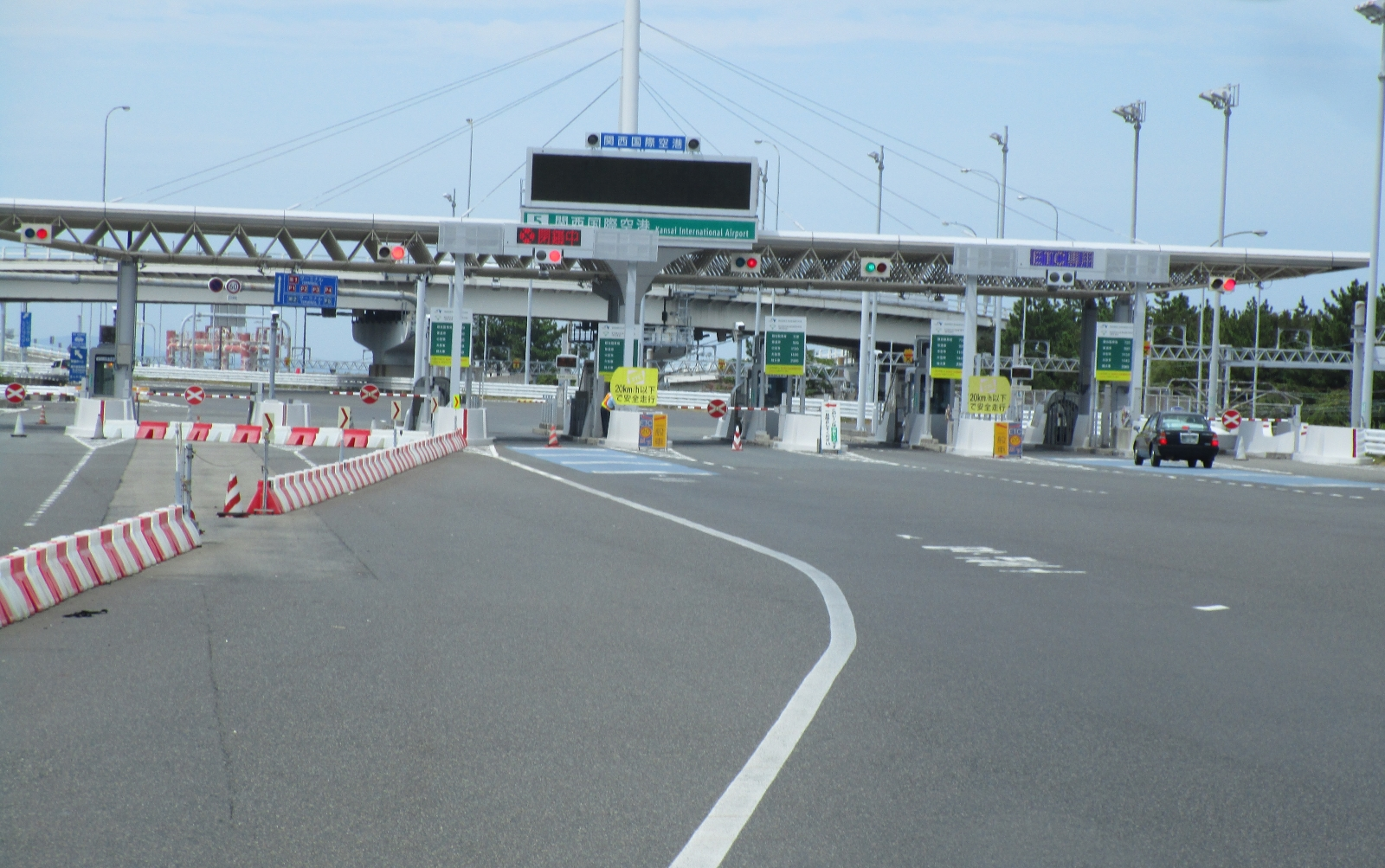 関西国際空港インターチェンジ料金所 出口方面（車内より撮影）